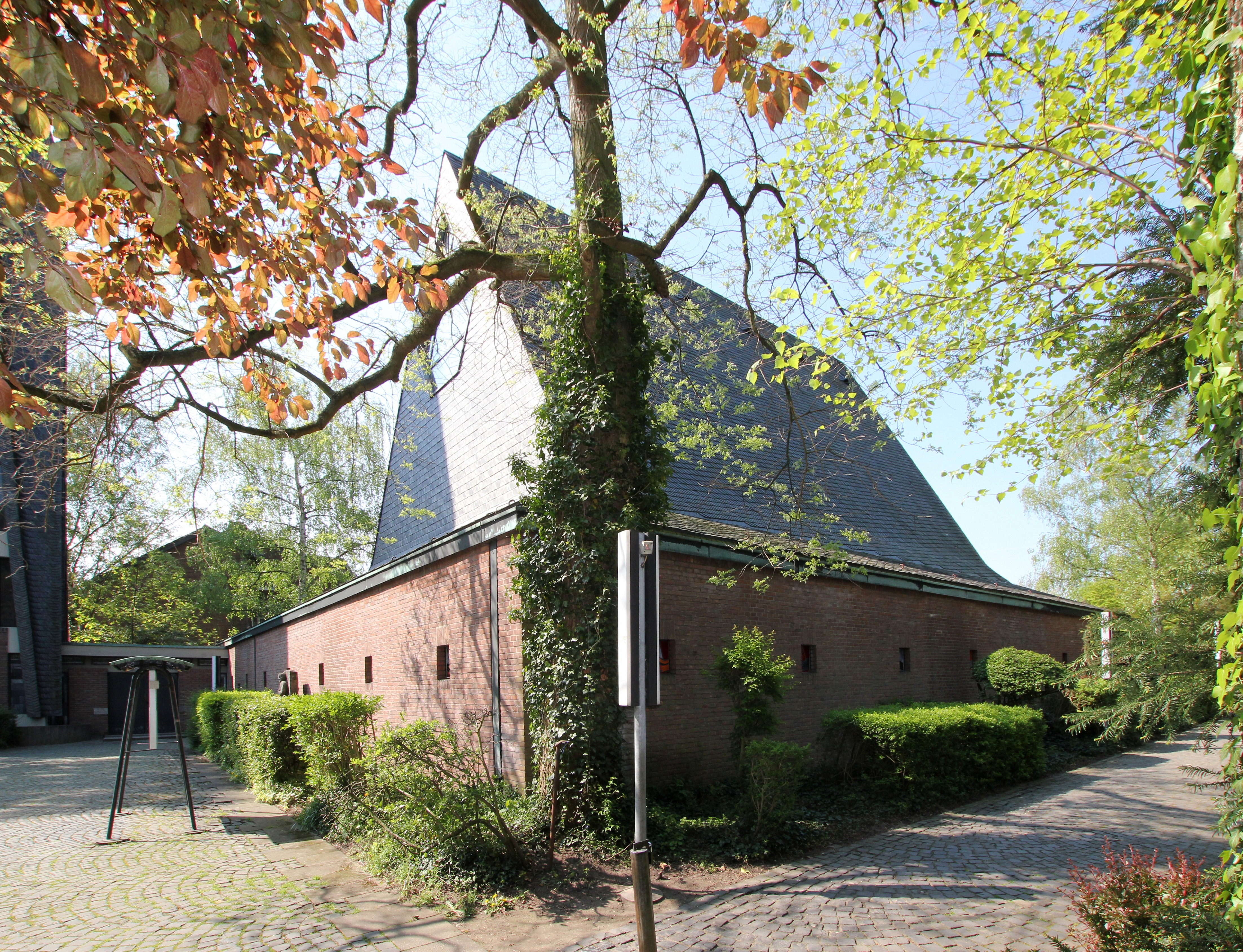 Köln-Lindenthal, Decksteiner Straße 5. St. Thomas Morus Kirche, Architekt Friz Schaller